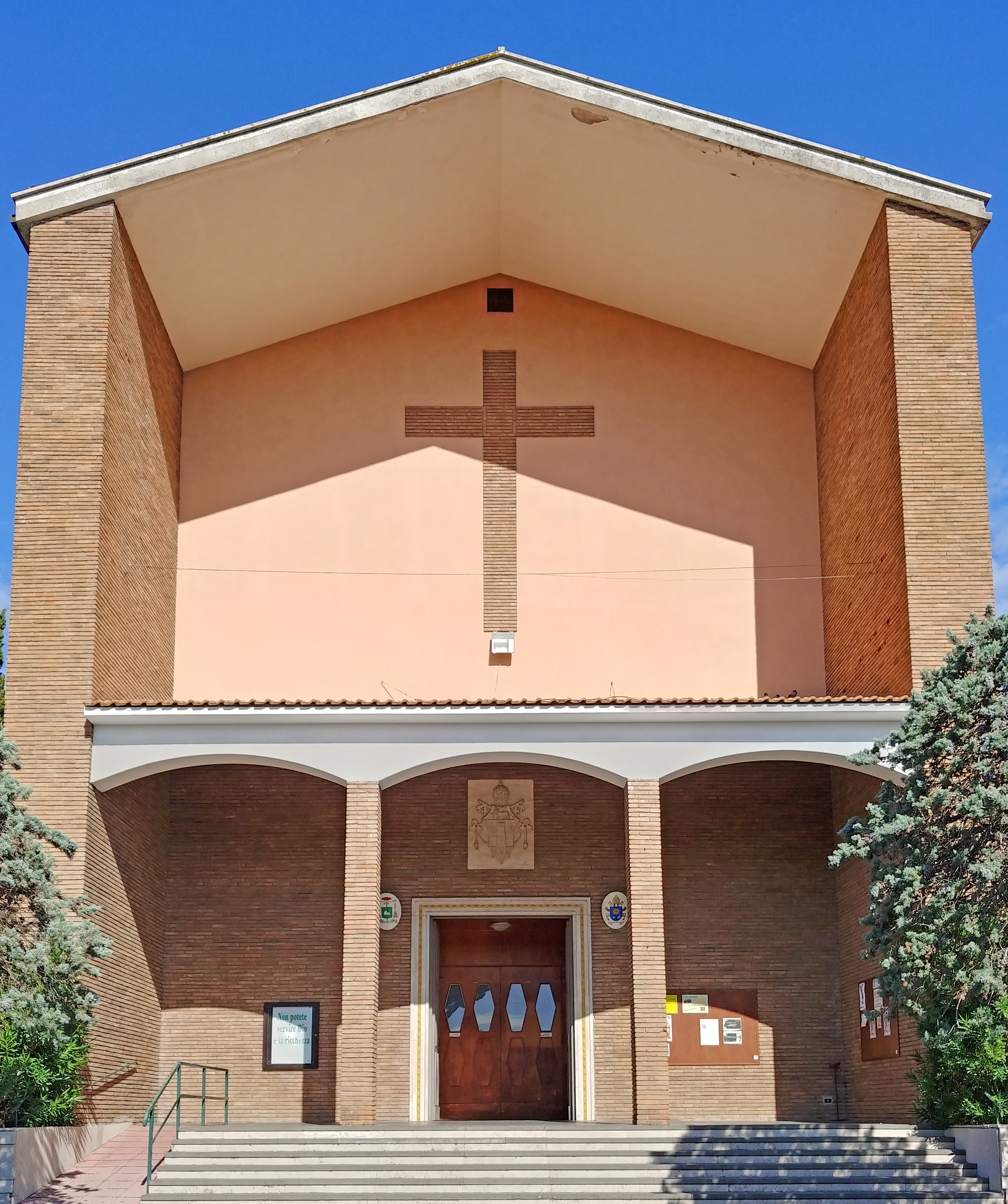 Facciata.